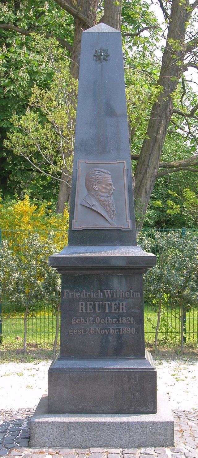 Braunschweig: Denkmal für Friedrich Wilhelm Reuter vor der Hauptfeuerwache der Berufsfeuerwehr Braunschweig, Feuerwehrstraße 1. Braunschweig, Germany: Memorial for Friedrich Wilhelm Reuter in front of the main fire station of Braunschweig Fire Brigade.